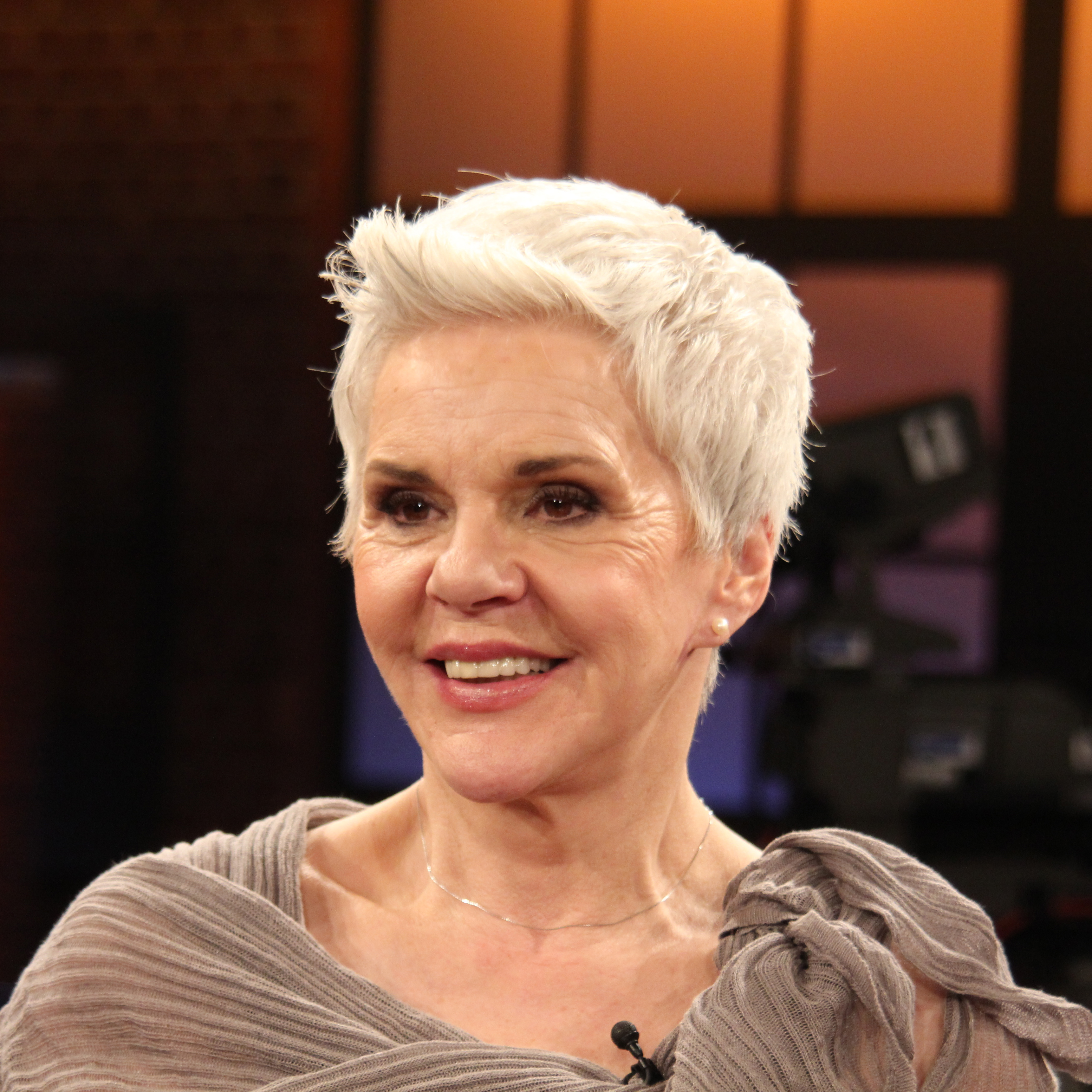 Foto nach der Aufzeichnung des Kölner Treffs, eine Fernsehsendung des Westdeutschen Rundfunks